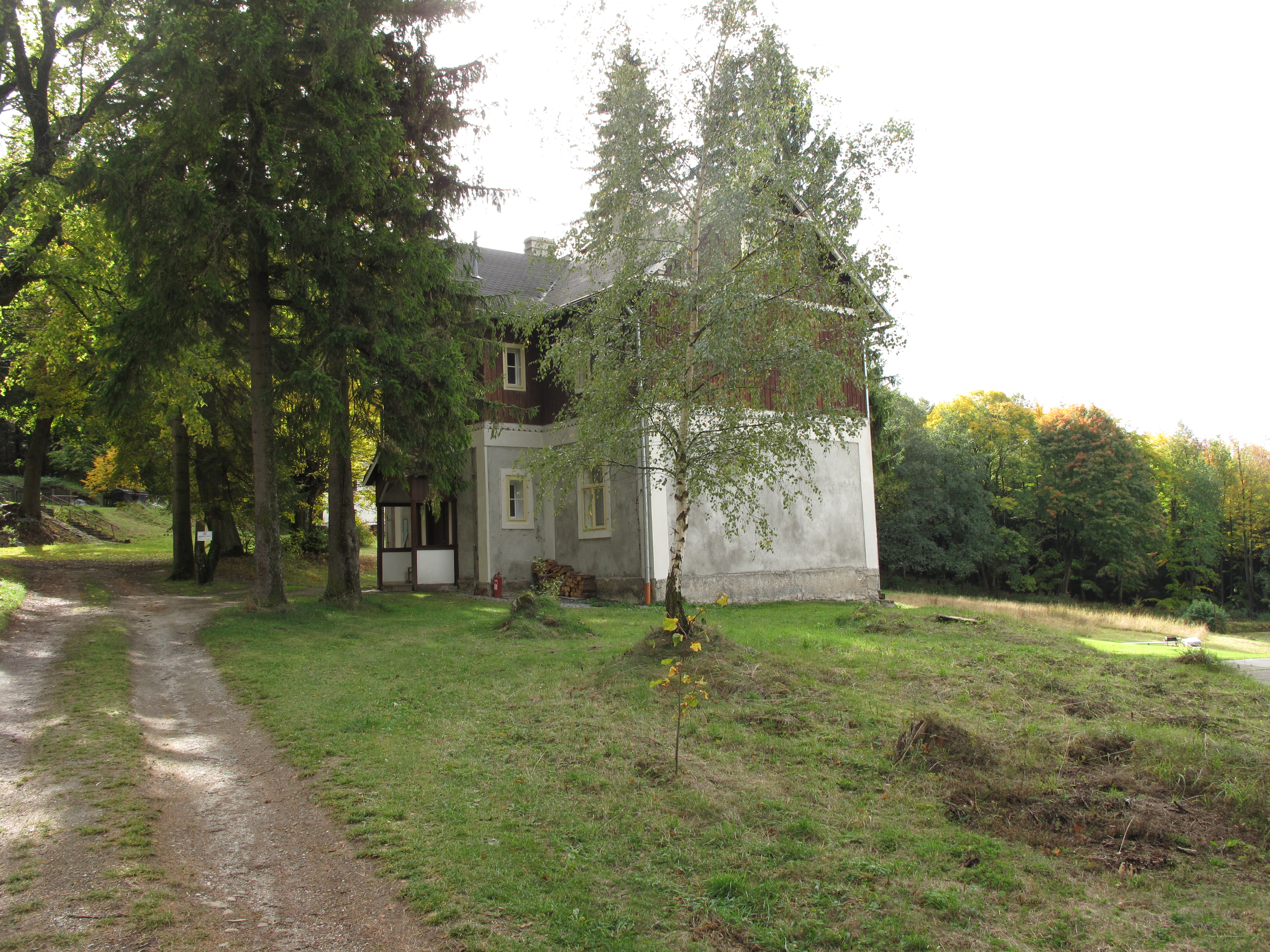 Odolenka. Okres Klatovy, Česká republika.